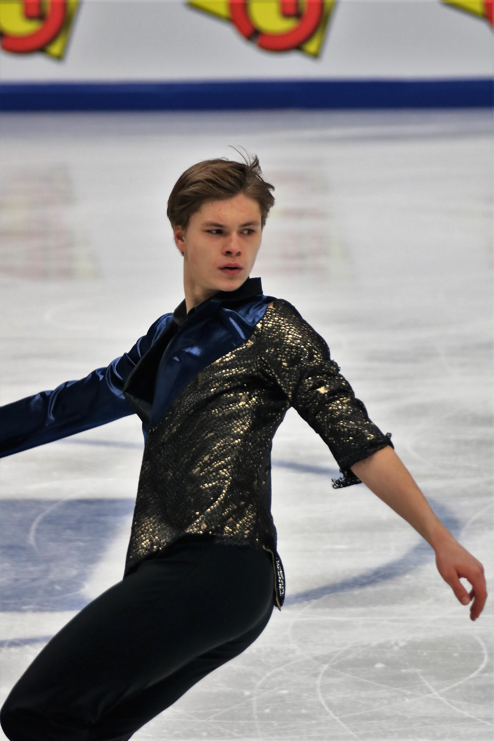 Денис Васильев (Латвия) на Чемпионате Европы по фигурному катанию 2018.